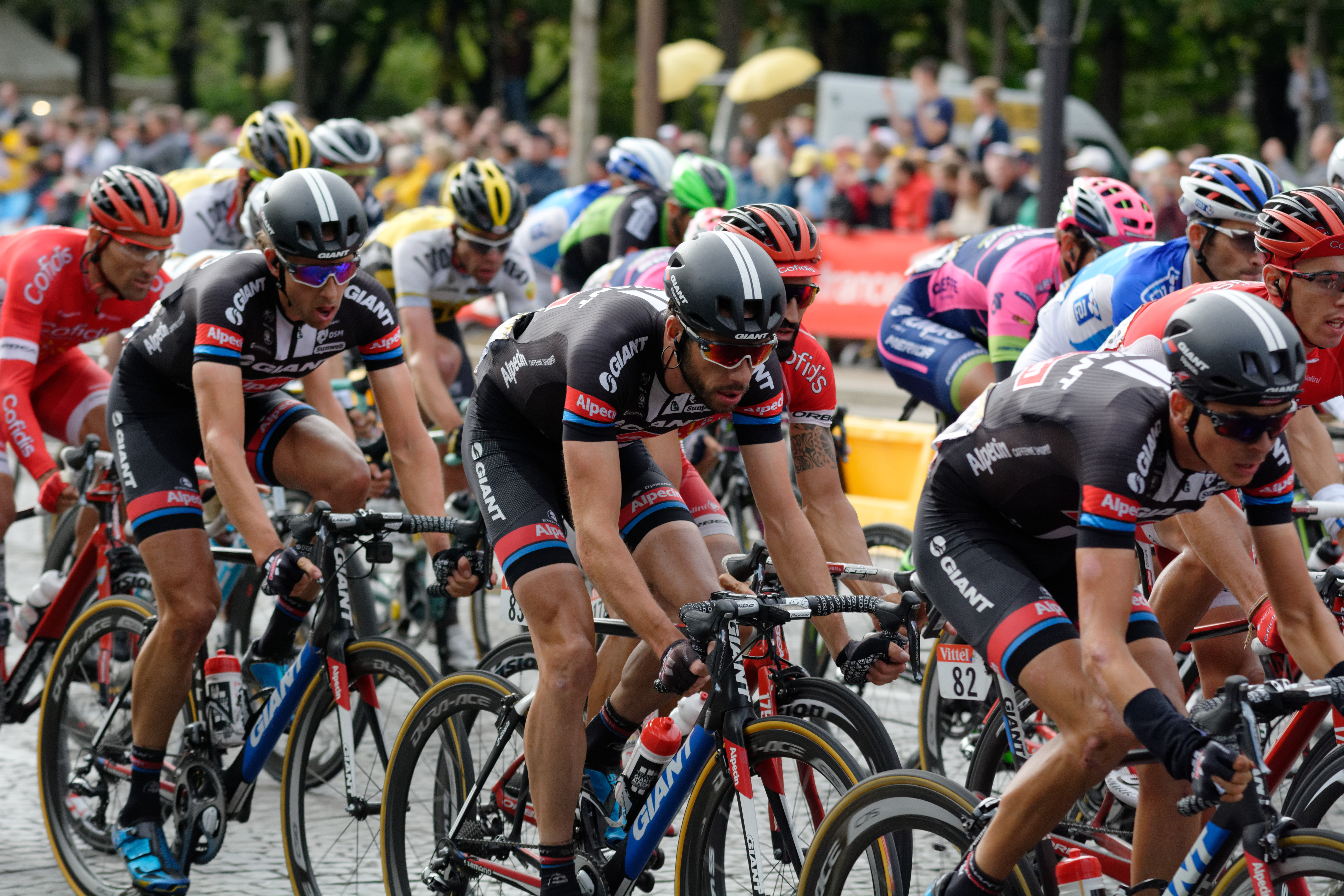 D71_3228_DxO